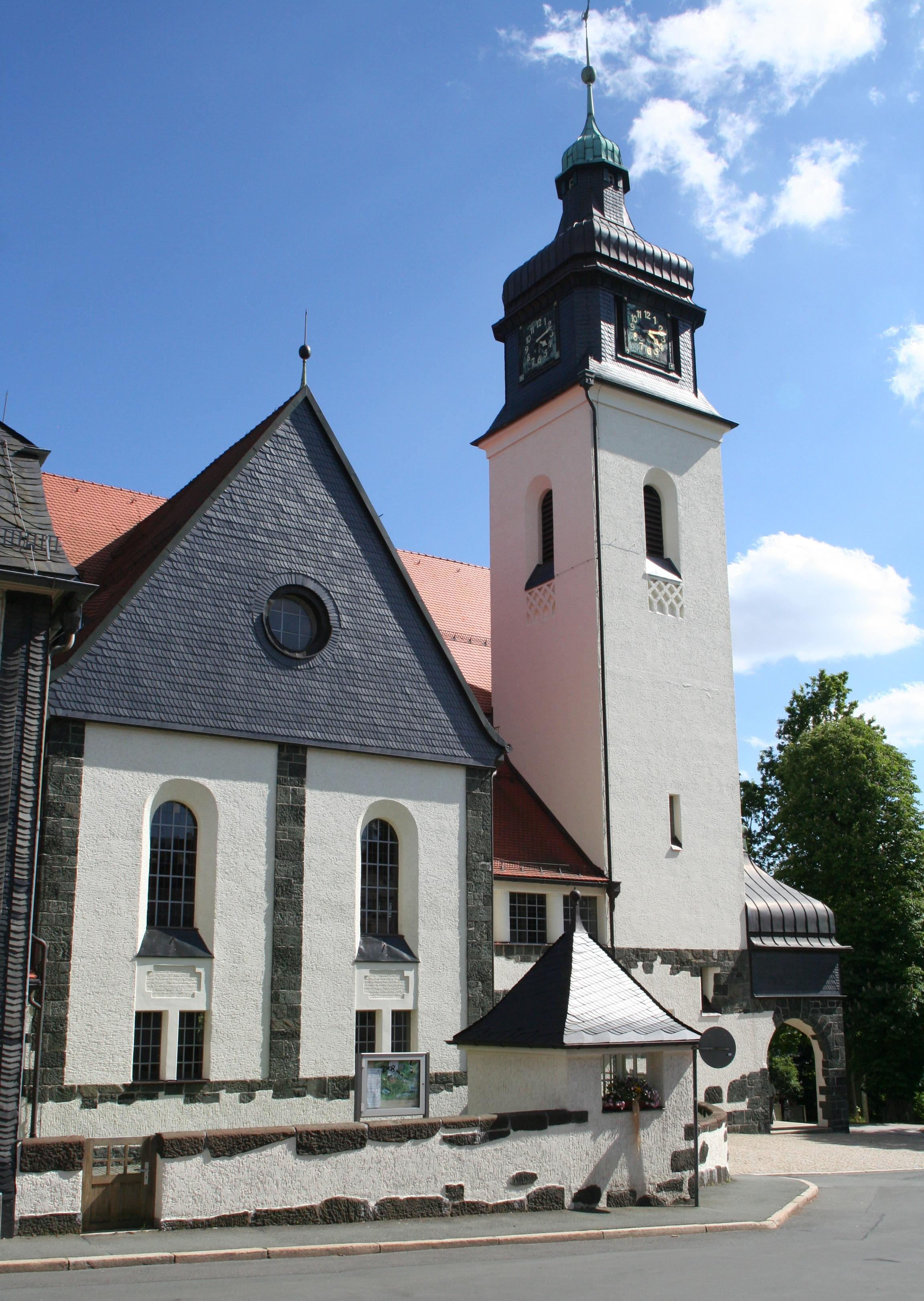 Bad Steben, Lutherkirche